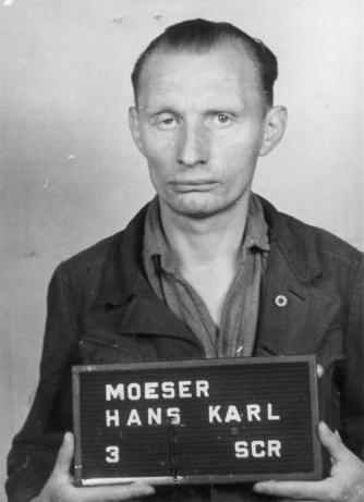 Haftbogenfoto des Angeklagten Hans Karl Möser (07.04.1906 in Darmstadt - 26.11.1948 in Landsberg am Lech), SS-Obersturmführer, Schutzhaftlagerführer des Konzentrationslagers Mittelbau-Dora, im Dachauer Dora-Prozess ("Case No. 000-50-37 Dora") am 30.12.1947 zum Tode verurteilt und hingerichtet.